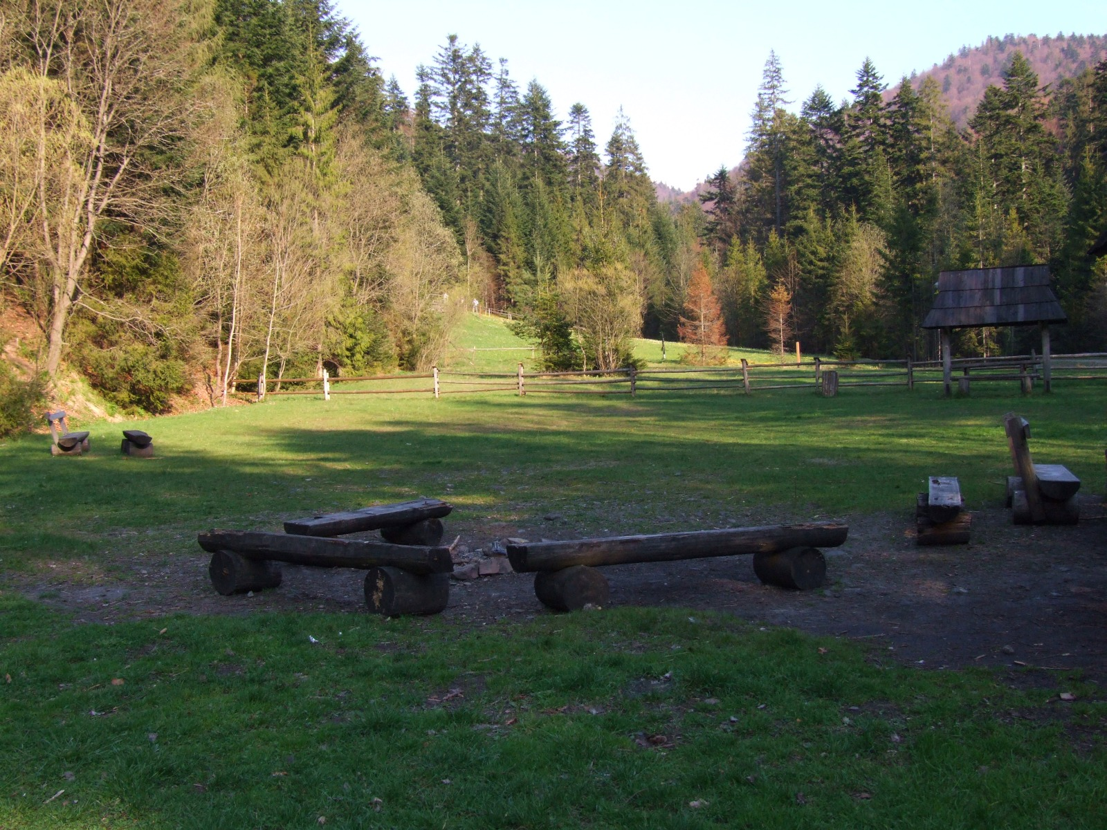 Polana Oberówka i pole namiotowe (Gorce)